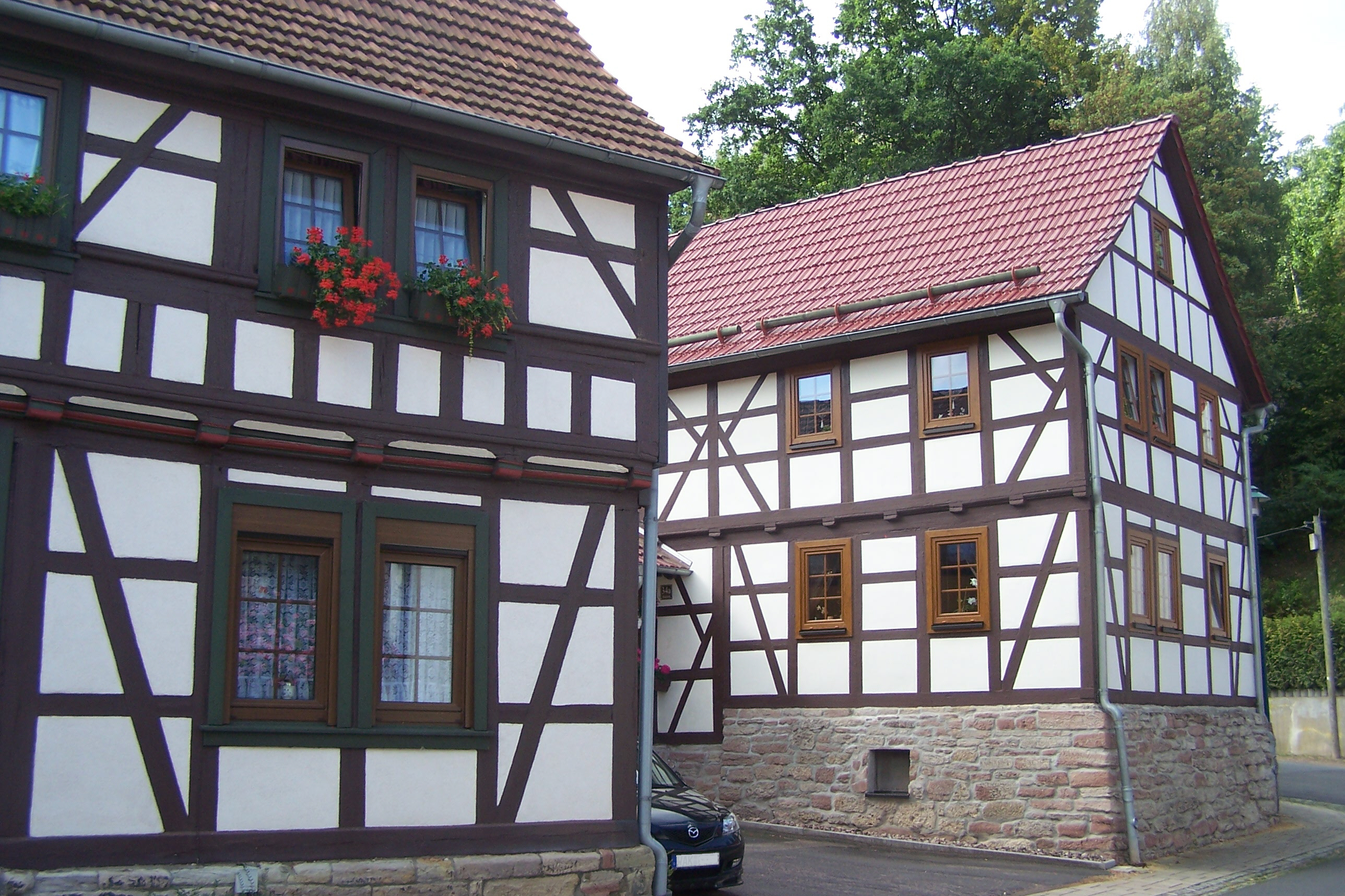 In der Ortslage von Farnroda finden sich noch einige liebevoll restaurierte Fachwerkhäuser.